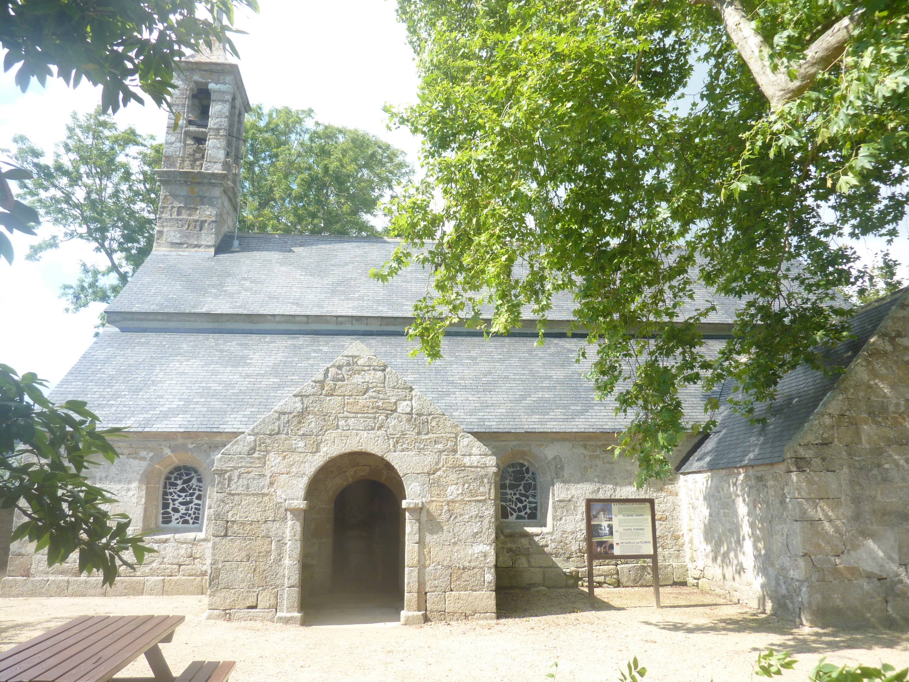 La chapelle Saint-Brieuc de Plonivel, ancienne église paroissiale ; elle date pour l'essentiel de 1778, même si certains éléments remontent à une chapelle antérieure datant de la fin du XVIe-début XVIIe siècles.